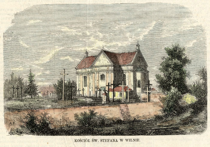 Беларуская (тарашкевіца): Вільня (Vilnia), Рудніцкае прадмесьце (Rudnickaje pradmieściе). Касьцёл Сьвятога Стэфана